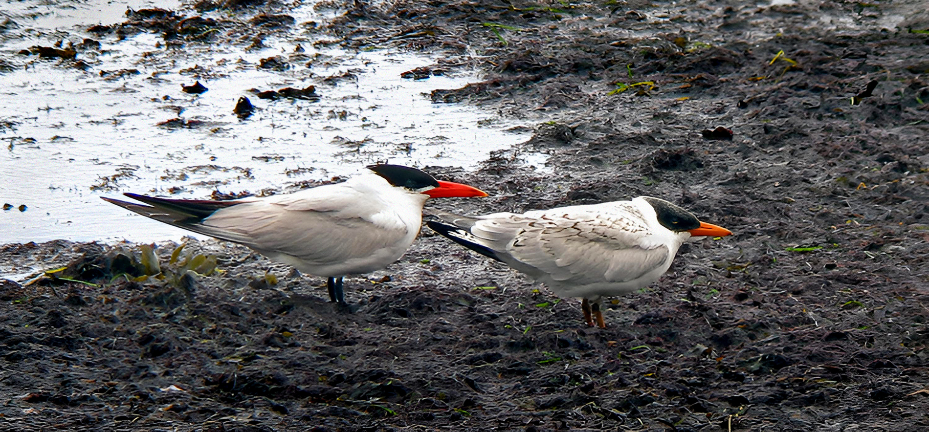 Skräntärna - Hydroprogne caspia - En adult med unge rastar vid Världens ände. Ystad 2011.